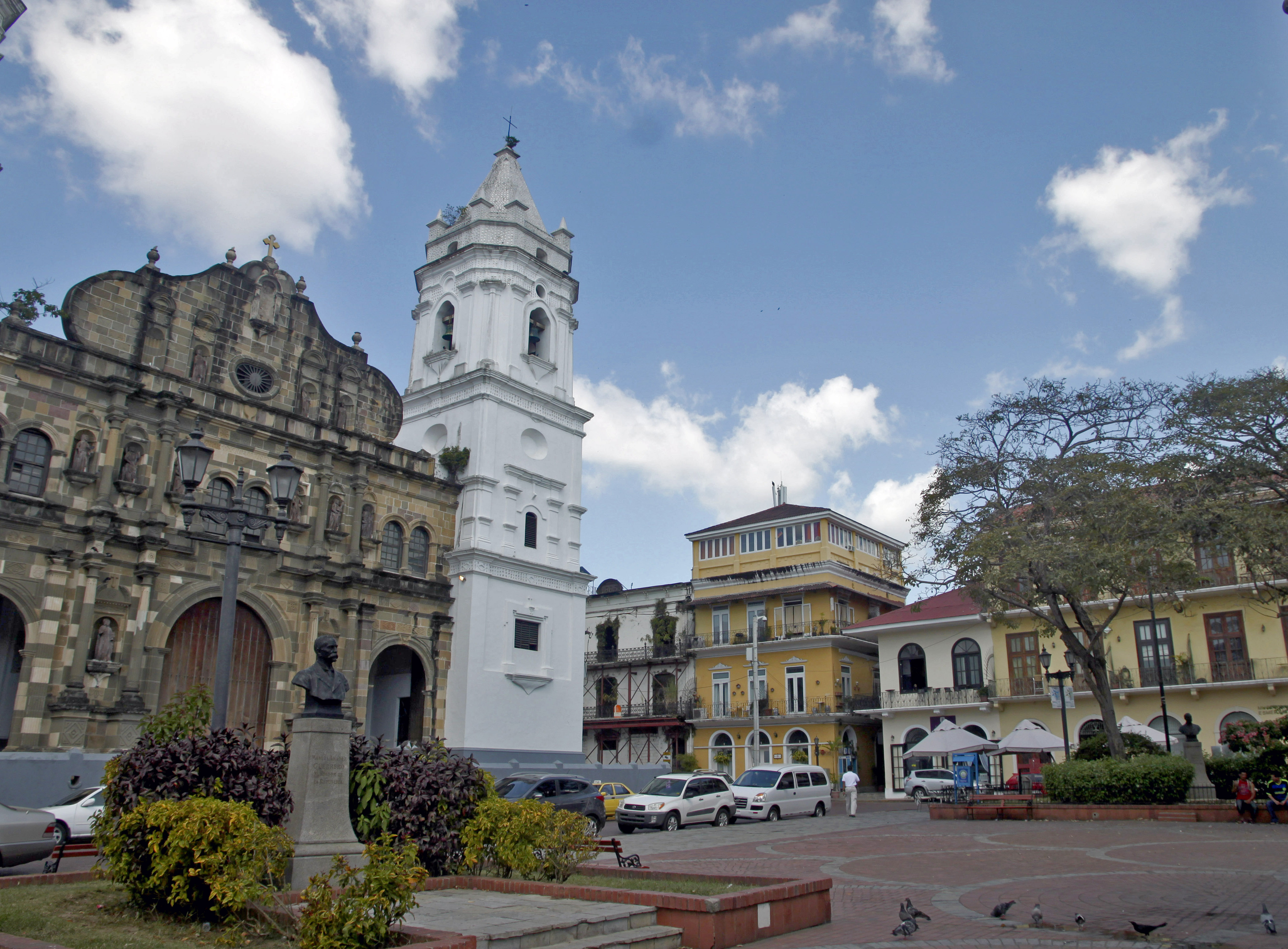 Vista Plaza Catedral con la catedral al fondo